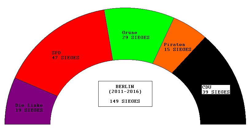 Elus du Landtag de Berlin en 2011